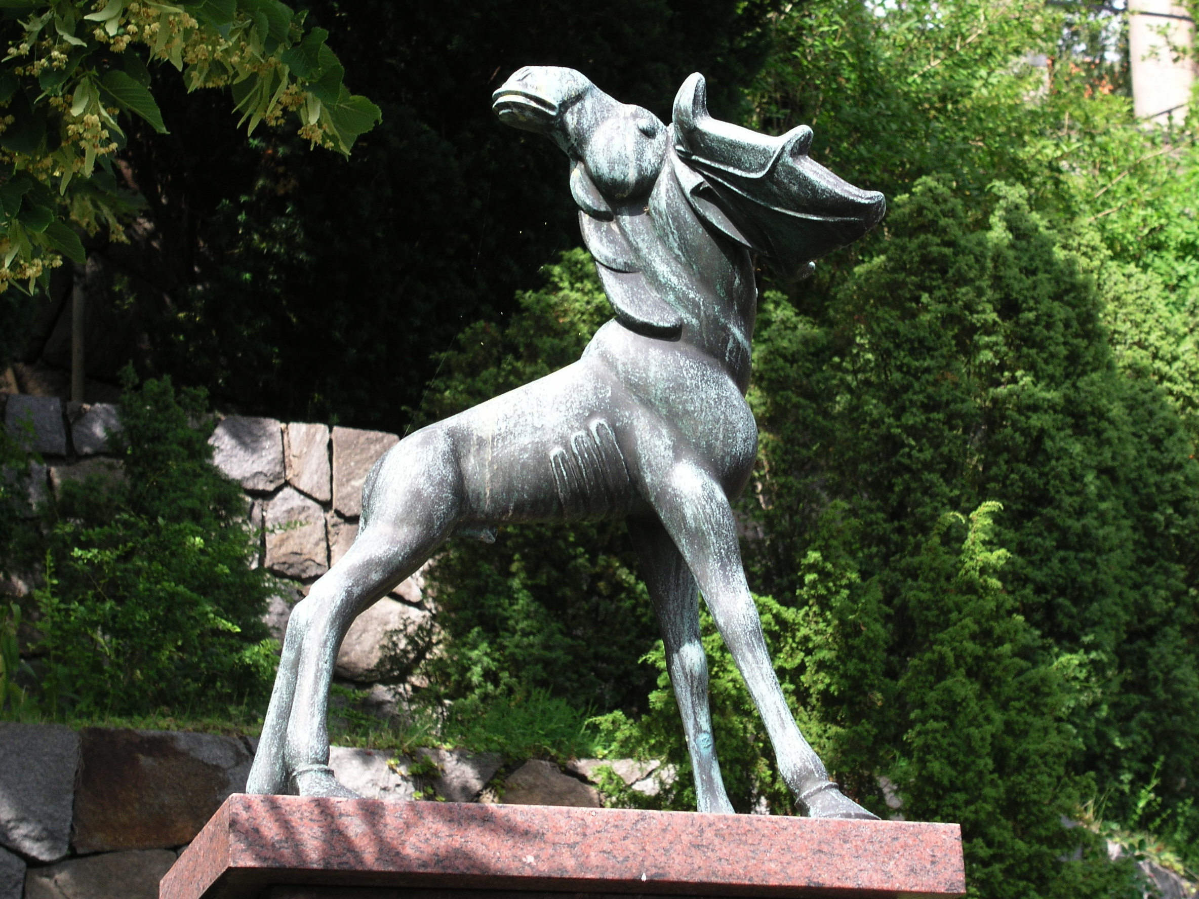 Älg, by Carl Milles. Millesgården, Lidingö, Sweden.